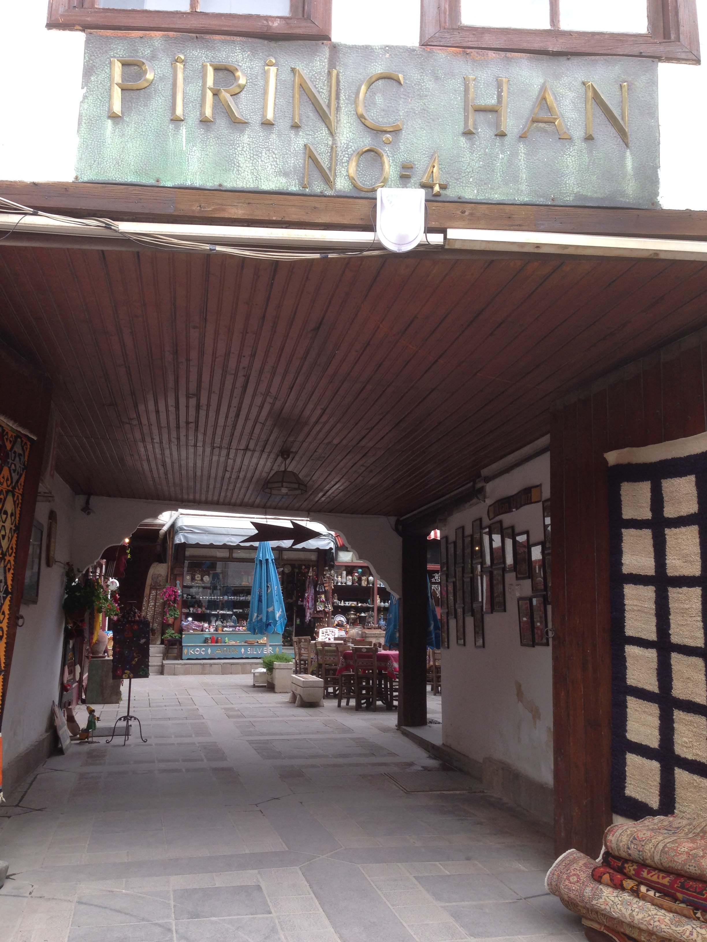 Pirinç Han, Ulus Ankara